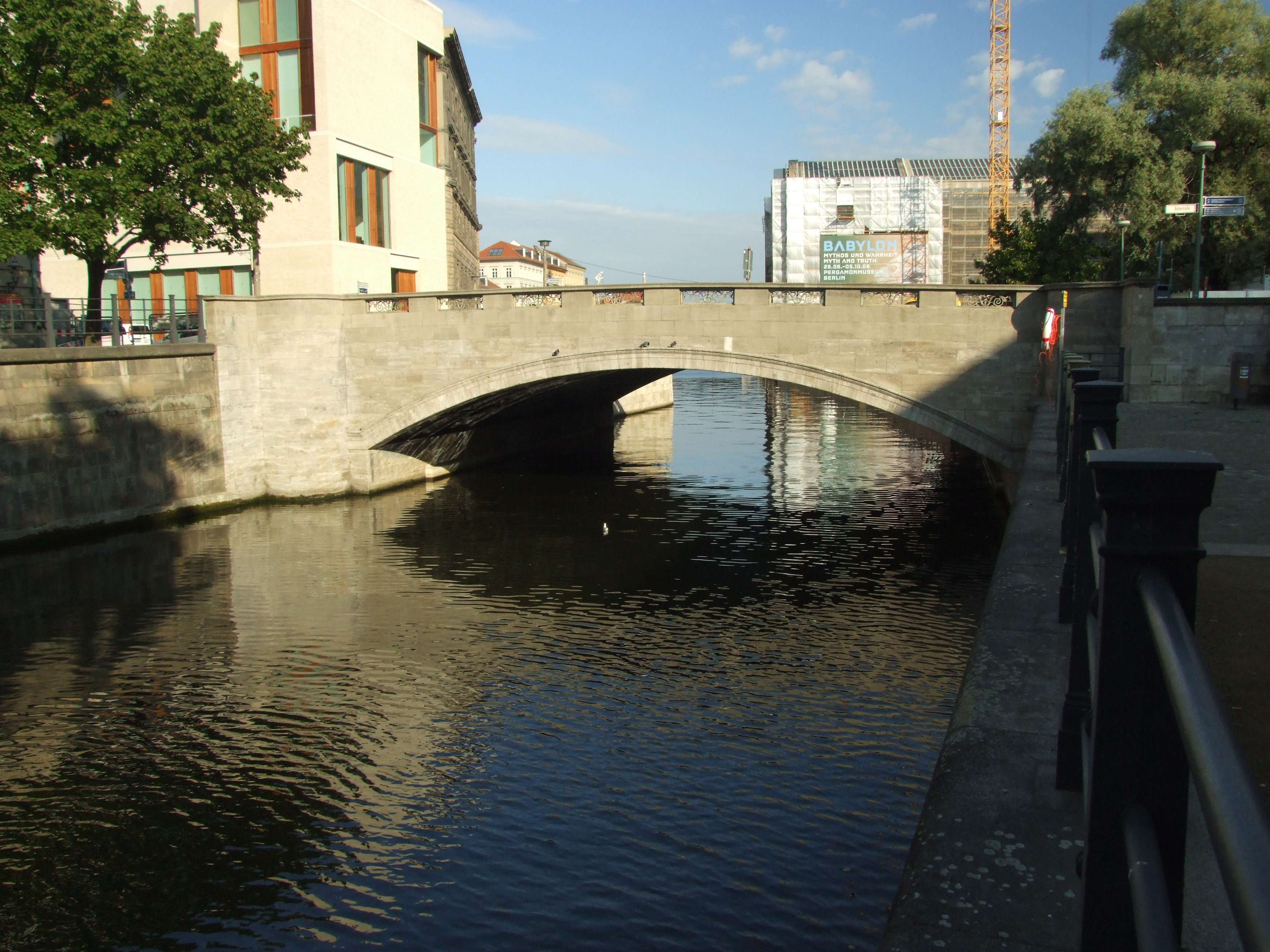 Das Bild zeigt die Eiserne Brücke in Berlin im Bezirk Mitte. Die Brücke überspannt den Kupfergraben und verbindet die Straßen Hinter dem Gießhaus mit der Bodestaße.